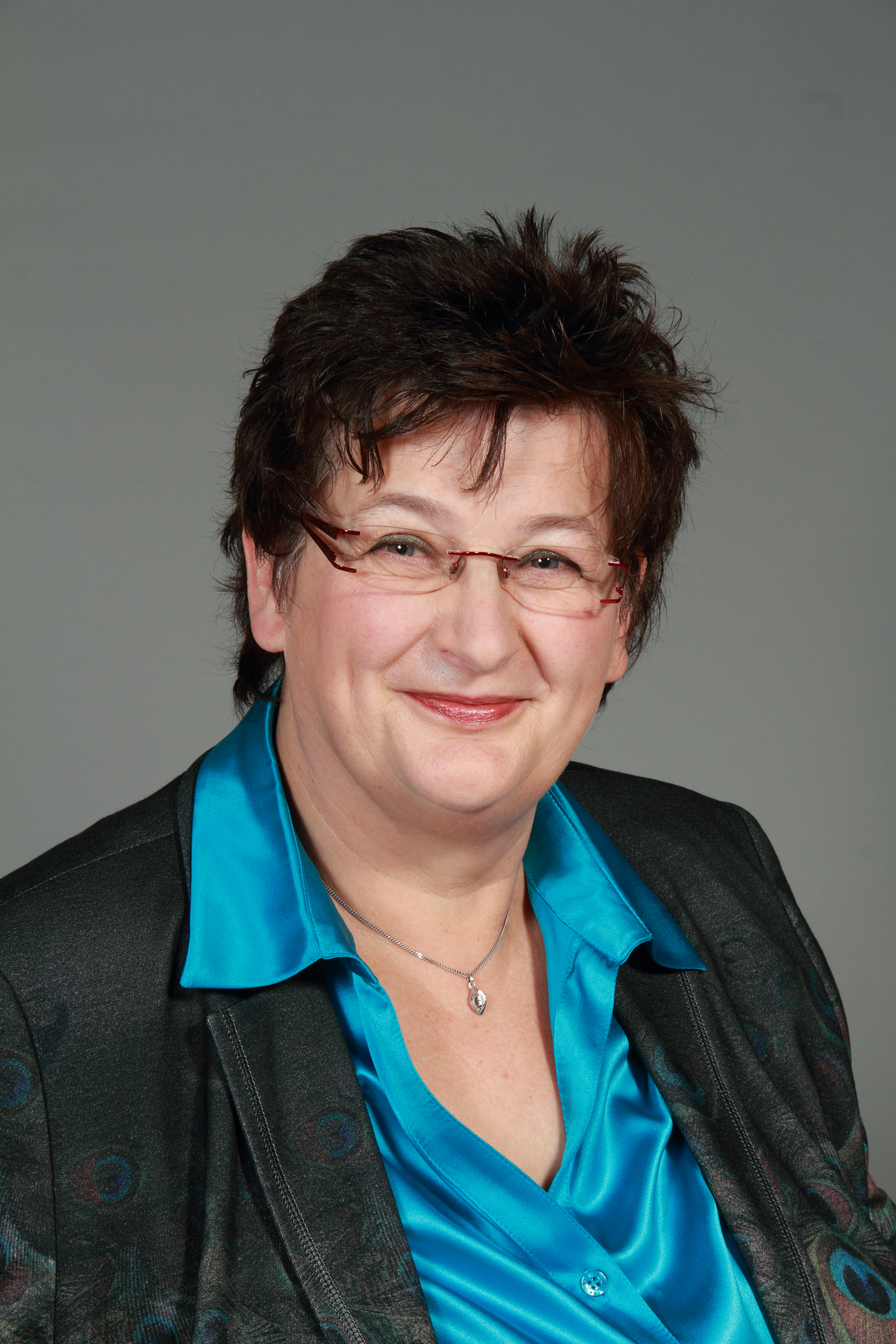 LandtagsabgeordneteR NRW